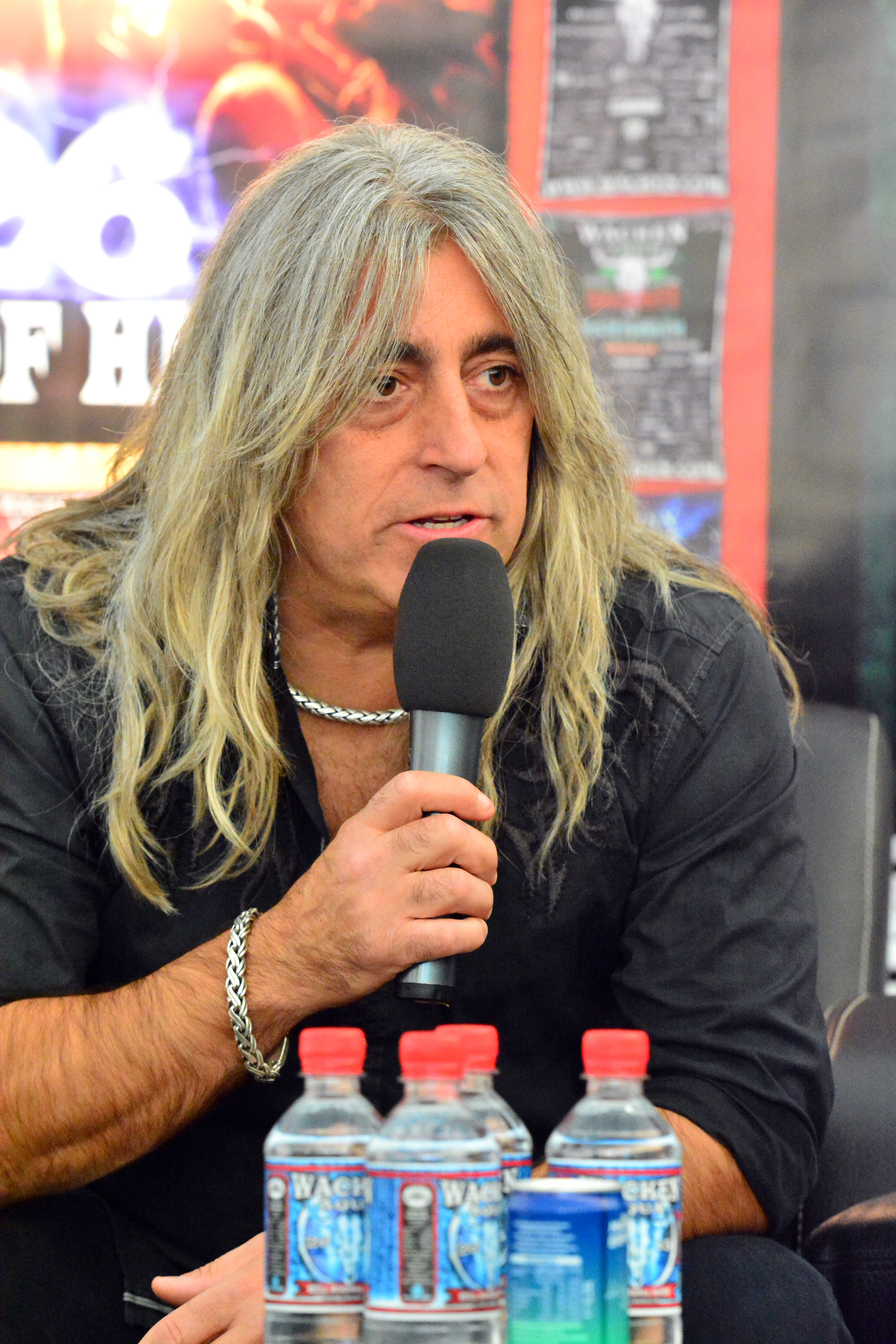 Mikkey Dee beim Wacken Open Air 2015